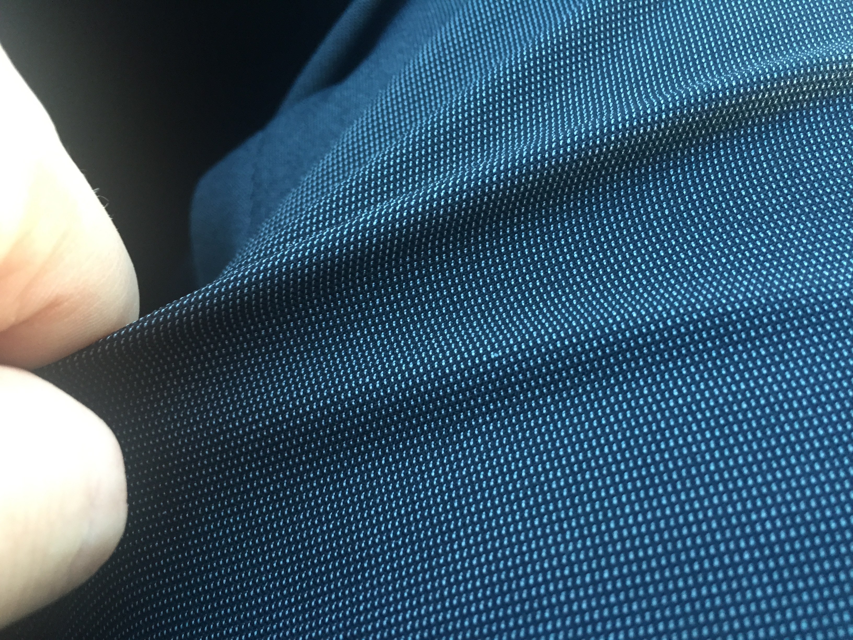 polesteris